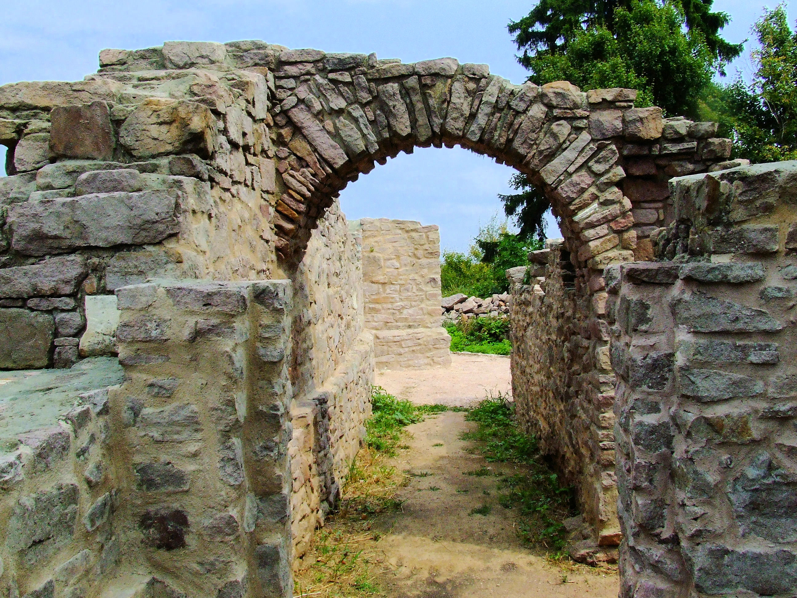 A Jakab-hegyi Pálos kolostor romjai